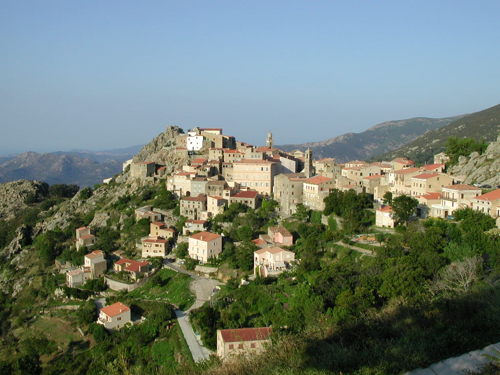 Vue générale du village de Speloncato (Houte Corse)